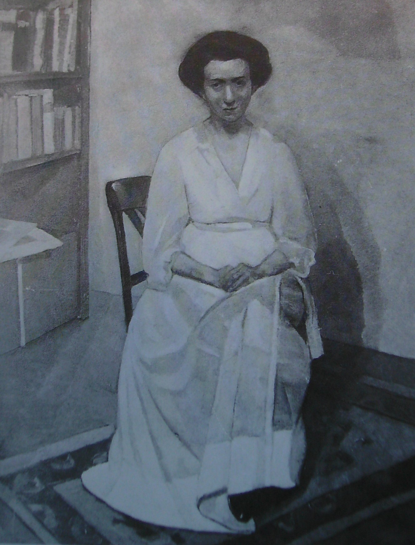 Portrait Margarete Weissgerber (Maaler: Albert Weisgerber, um 1910)